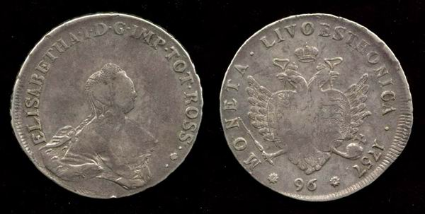 Ливонез. Монета для Прибалтийских провинций России Лифляндии и Эстляндии. 96 Копеек 1757 г. Серебро, 26,67 гр.